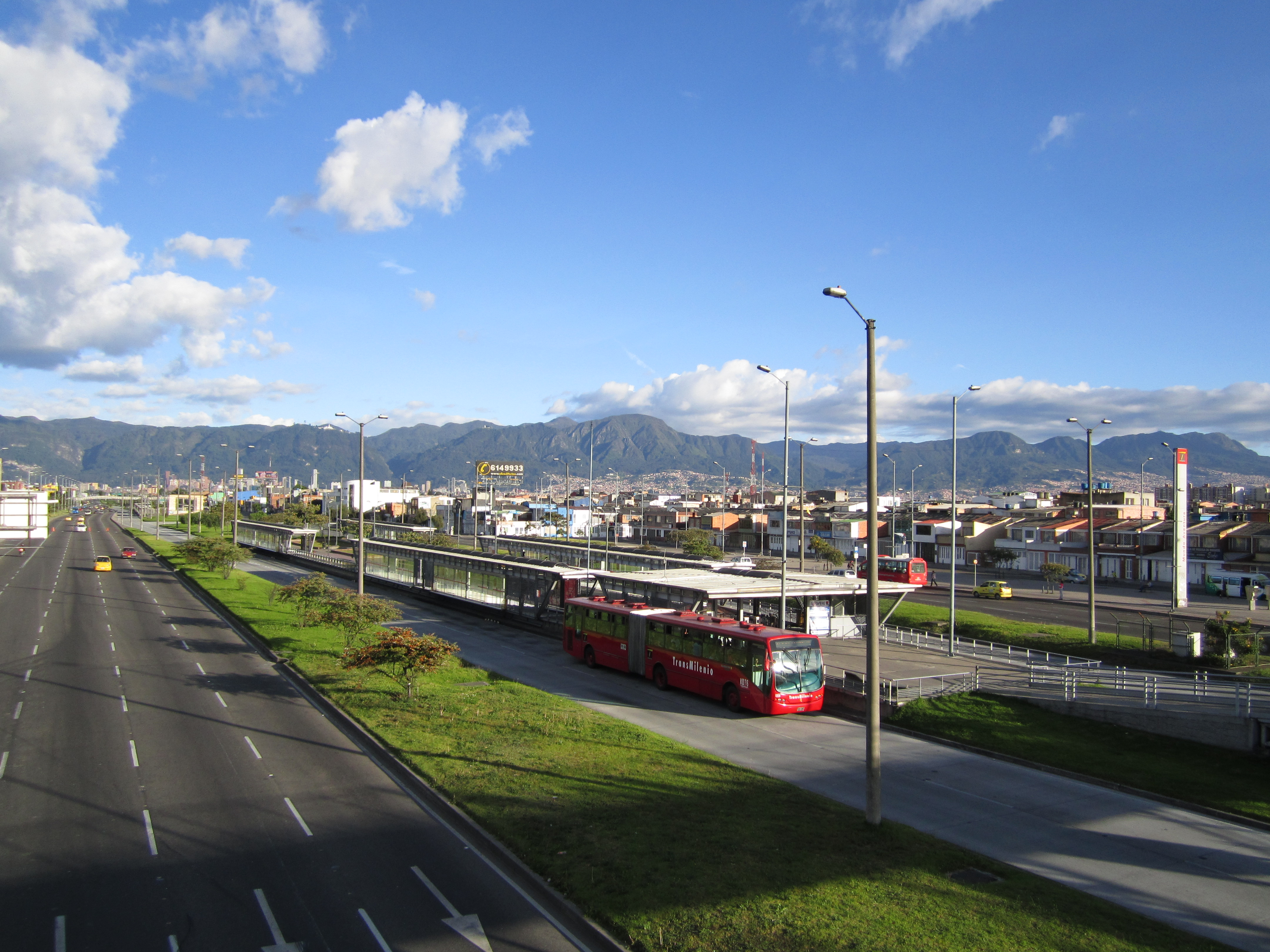 Bus articulado en la estación Mundo Aventura del sistema Transmilenio. Avenida de las Américas con carrera 71 C, localidad de Kennedy, ciudad de Bogotá.